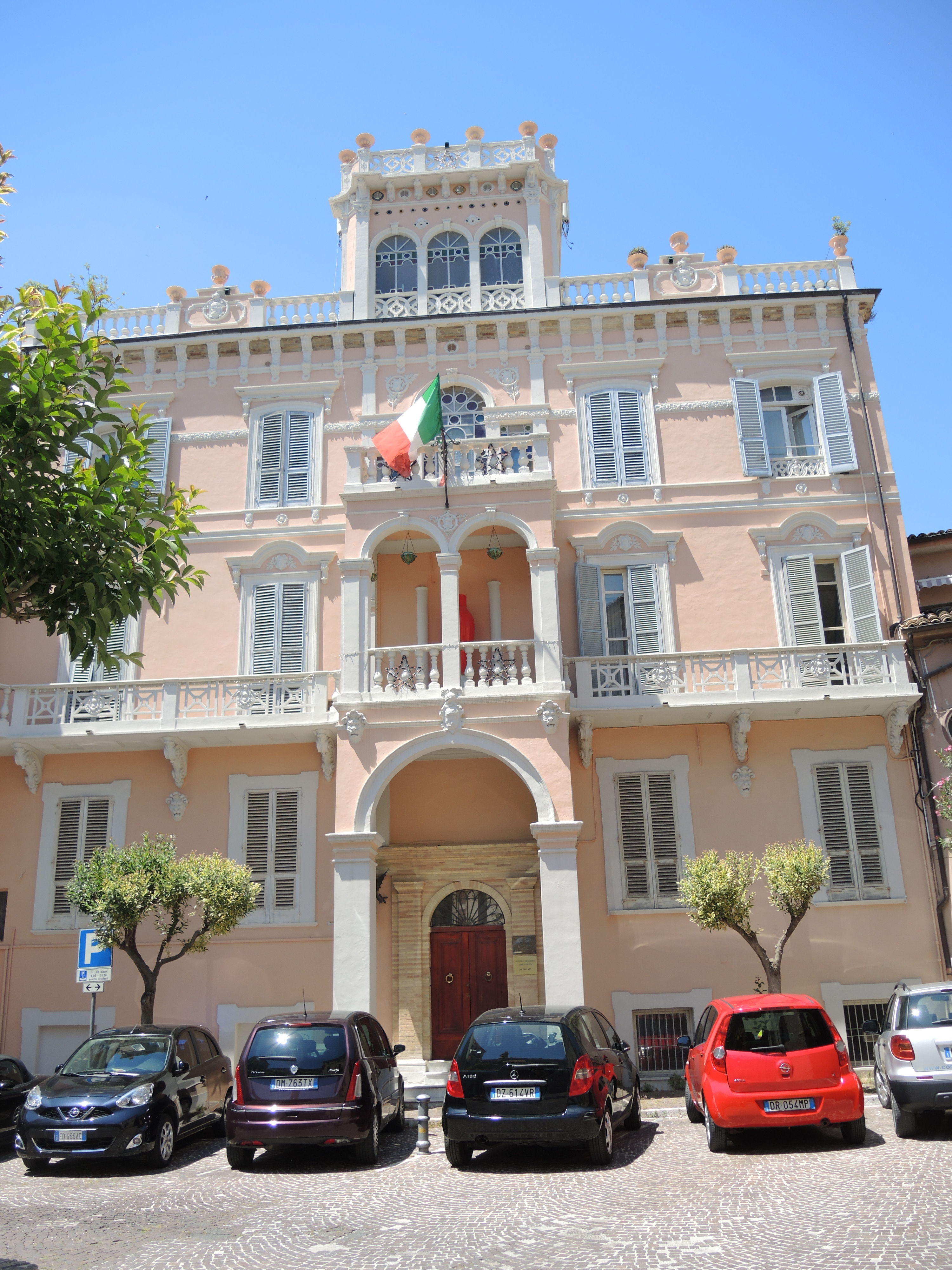 Lanciano - Palazzo del Capitano